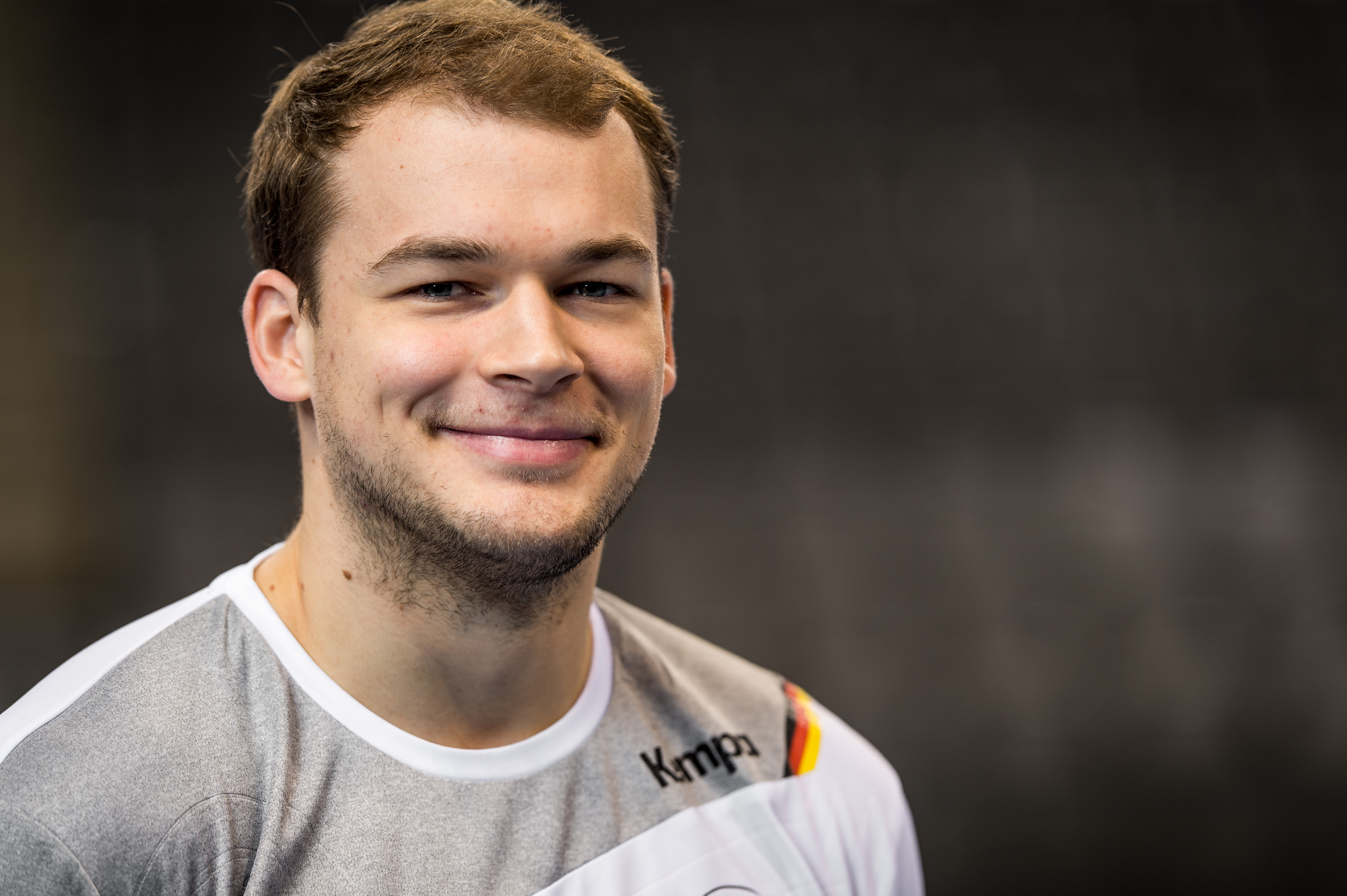 Paul Drux beim Pressetermin der Deutschen Handballnationalmannschaft am 4. Januar 2018 in der Porsche-Arena in Stuttgart